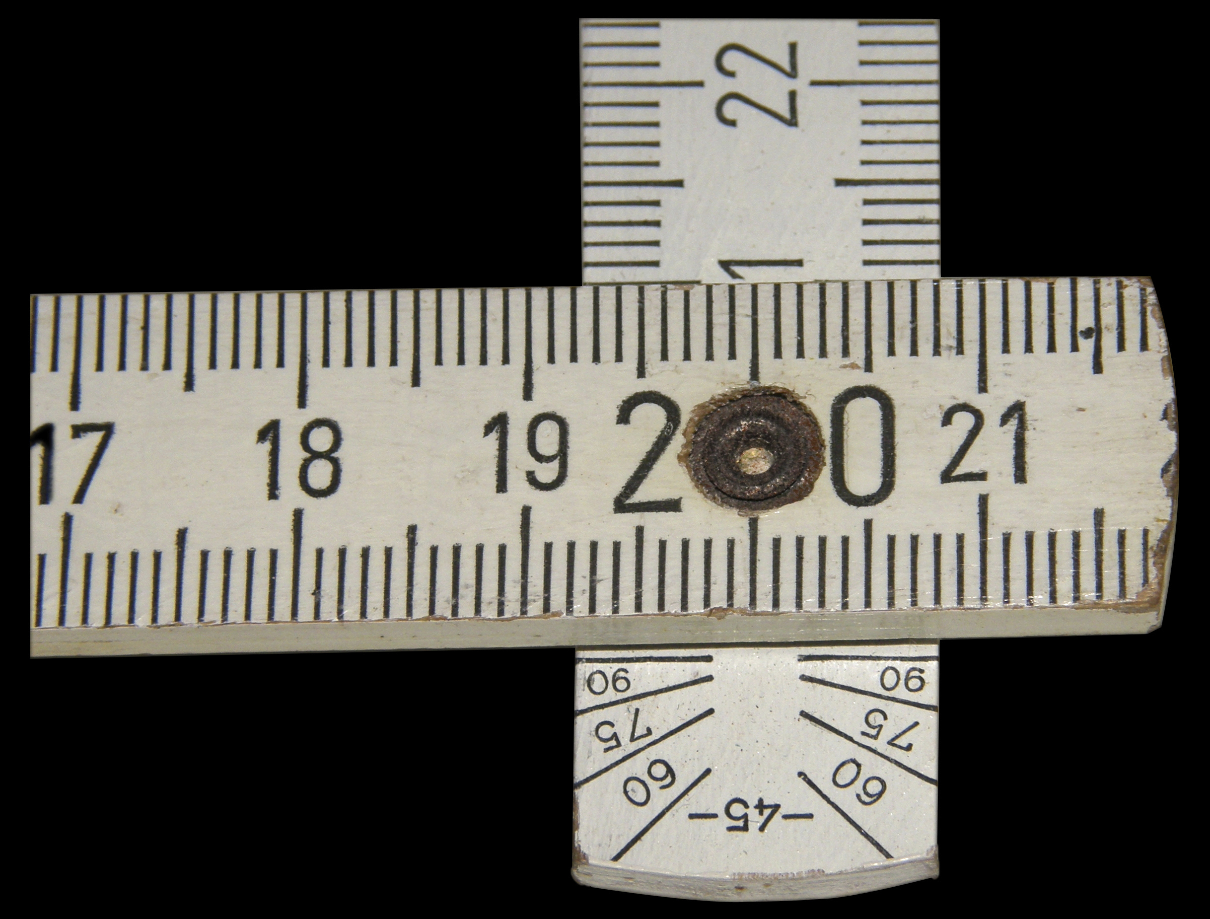 "Grobe" Winkelmessereinteilung am "Meter" (Zollstock) 45-90°